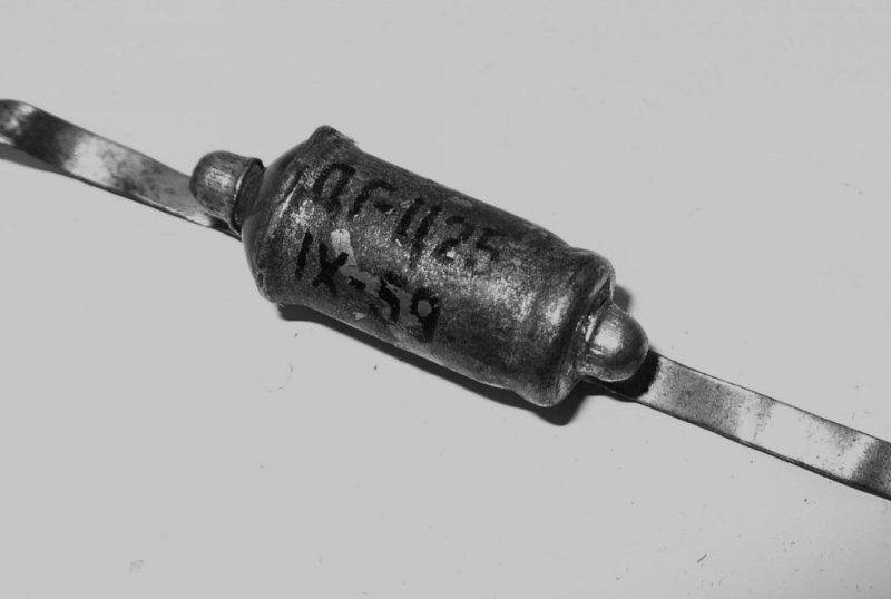 Полупроводниковый диод ДГЦ-25